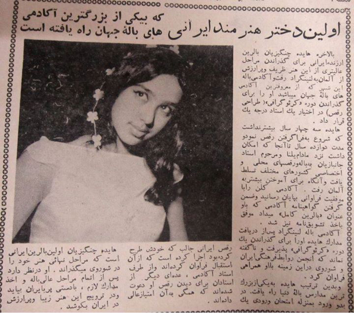 هایده چنگیزیان در یک مجله قدیمی